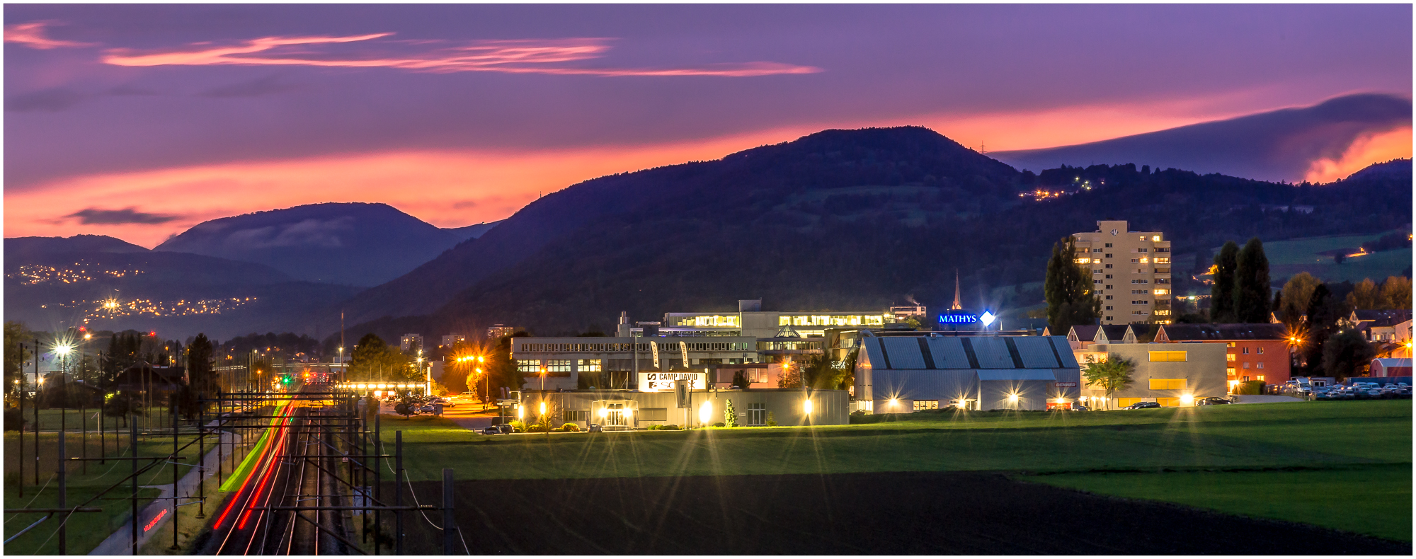 Bettlach, Industrie, Bahnlinie